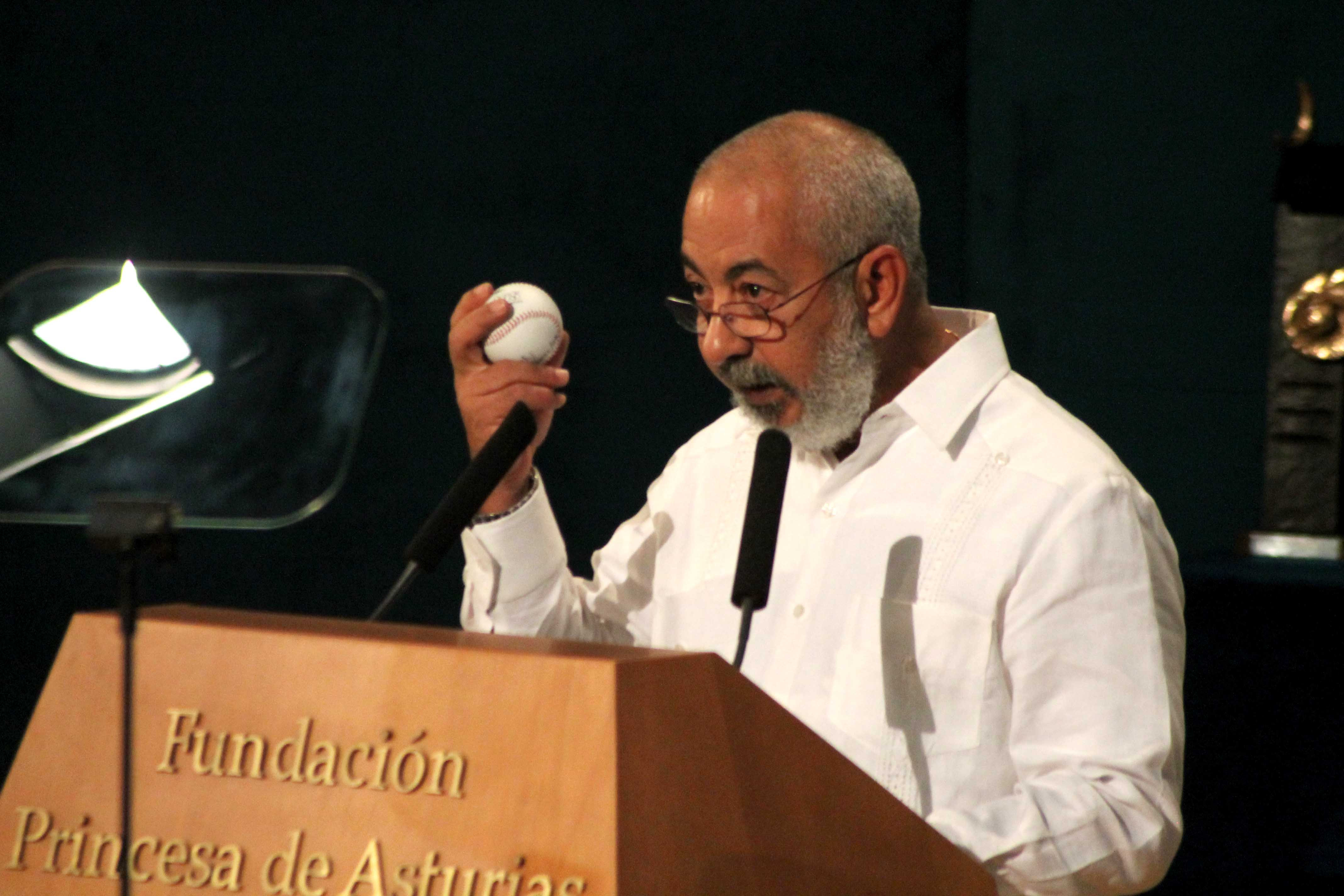 Premios Princesa de Asturias 2015